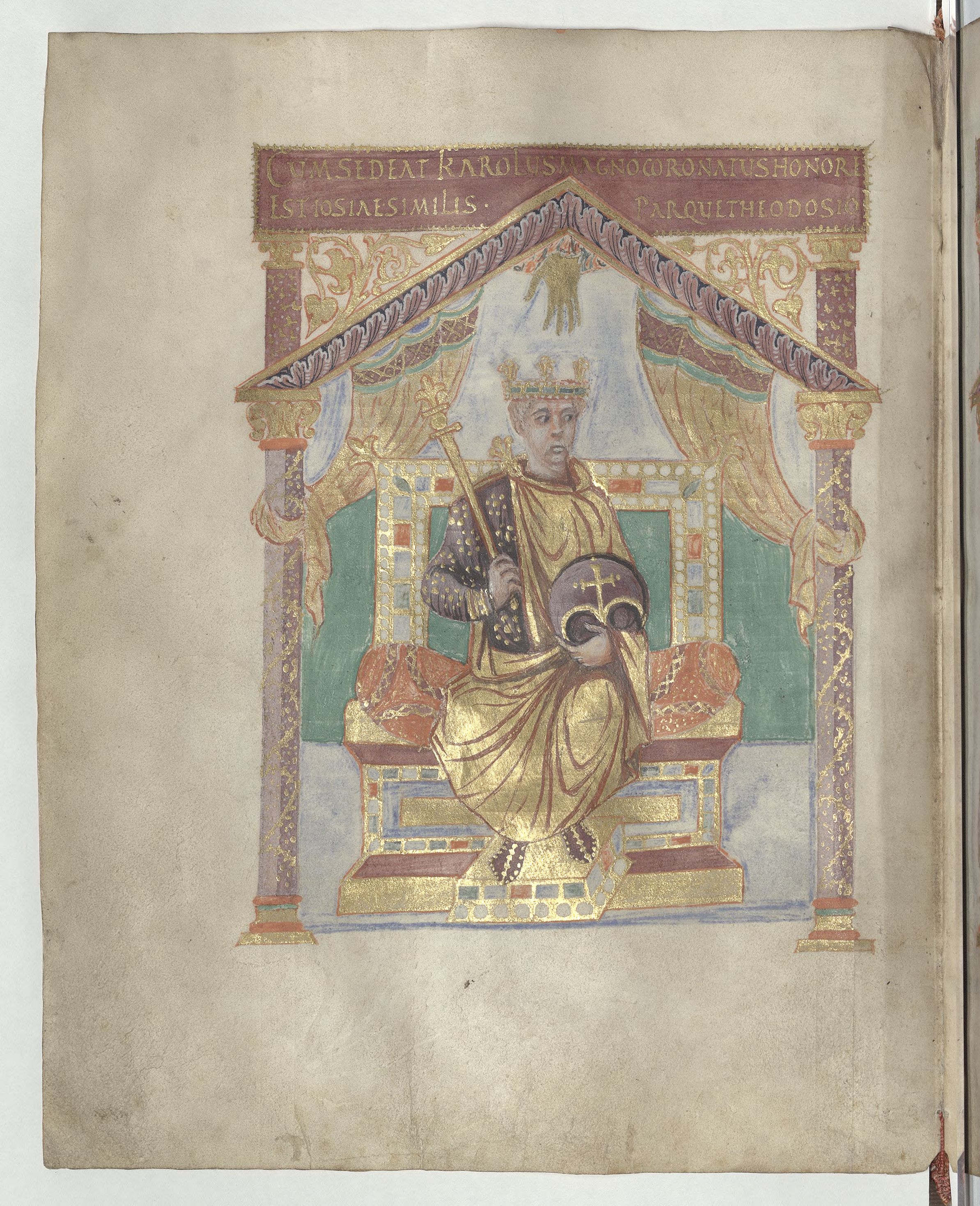 Psautier de Charles le Chauve, copié par Liuthard. Charles le Chauve trônant. Conservé dans son état originel, ce psautier allie l'élégance de la copie et le luxe des peintures à une reliure exceptionnelle. Le destinataire, Charles le Chauve, y figure assis sur un trône et tenant dans sa main un sceptre et un globe, symboles de sa fonction avec la légende Cum sedeat Karolus magno coronatus honore est Josiae similis parque Theodosio.